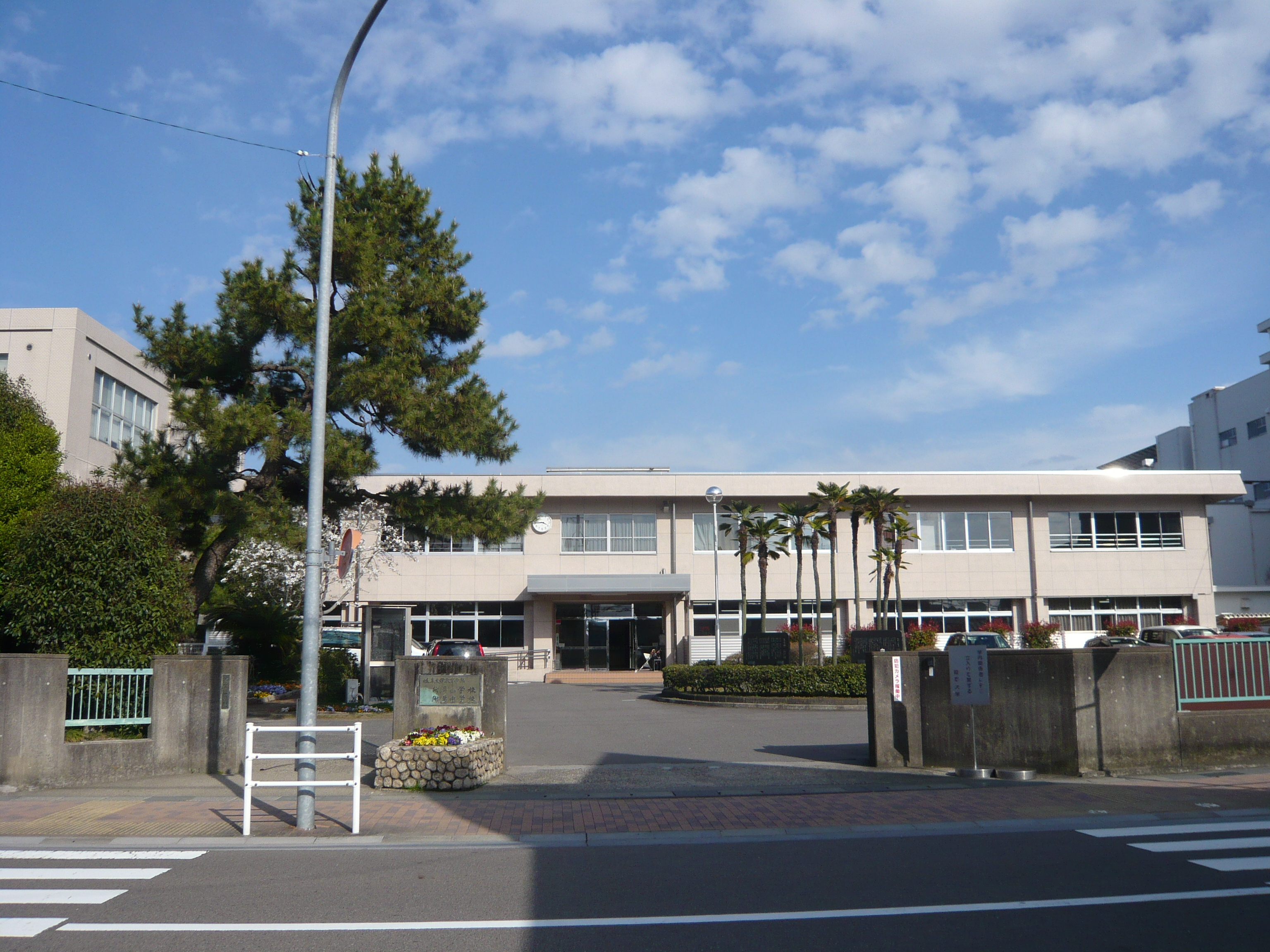 岐阜大学教育学部付属小学校・中学校